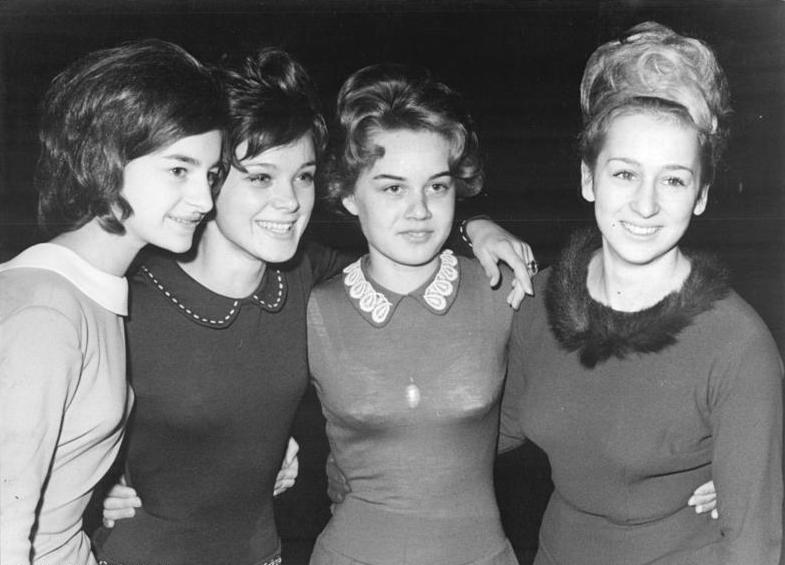 M. Mirmseker, U. Kessler, A. Wagner, H. Steiner Zentralbild Kohls 12.12.1963 Schneider Eiskunstlauf: Ralph Borghardt und Uschi Kessler führen nach der Pflicht Die Qualifikation der Eiskunstläufer aus den beiden deutschen Staaten um die noch vier offenen Plätze in der Gemeinsamen deutschen Olympiamannschaft für Innsbruck begannen am 12.12.1963 in der Berliner Werner-Seelenbinder-Halle mit dem Pflichtlaufen der Männer und Frauen. Nach insgesamt 5 Pflichtfiguren konnte sich der Deutsche Meister Ralph Borghardt mit klarem Vorsprung vor dem Oberstdorfer Sepp Schönmetzler an die Spitze setzen. In der Auseinandersetzung um den noch freien Platz bei den Frauen ist Uschi Kessler (Westdeutschland) nach einer ausgeglichenen Leistung der Pflicht in Führung gegangen. UBz: Diese Vier kämpfen um den noch freien Platz bei den Frauen: Marianne Mirmseker (DDR), Uschi Kessler, Angelika Wagner (beide Westdeutschland) und Heidi Steiner (DDR). -vlnr- Abgebildete Personen: Kessler, Uschi: Eiskunstläuferin, Bundesrepublik Deutschland Steiner, Heidemarie: Eiskunstläuferin, SC Dynamo Berlin, Olympiade 1968, DDR Mirmseker, Marianne: Eiskunstläuferin, DDR